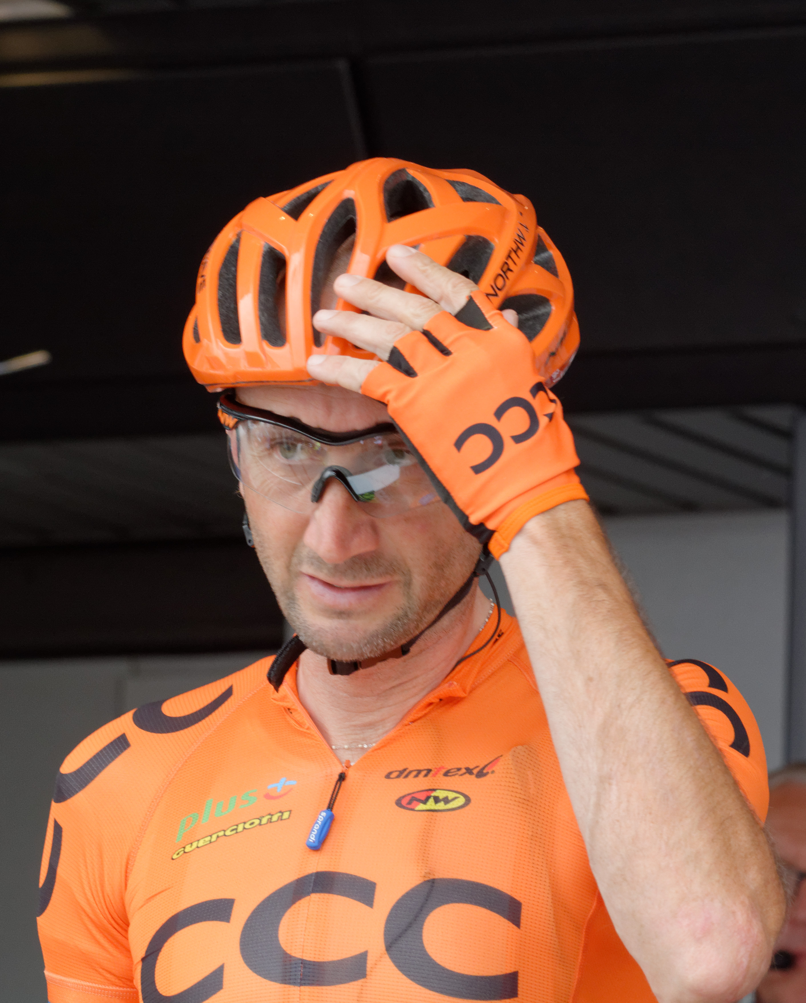 D71_9973_DxO